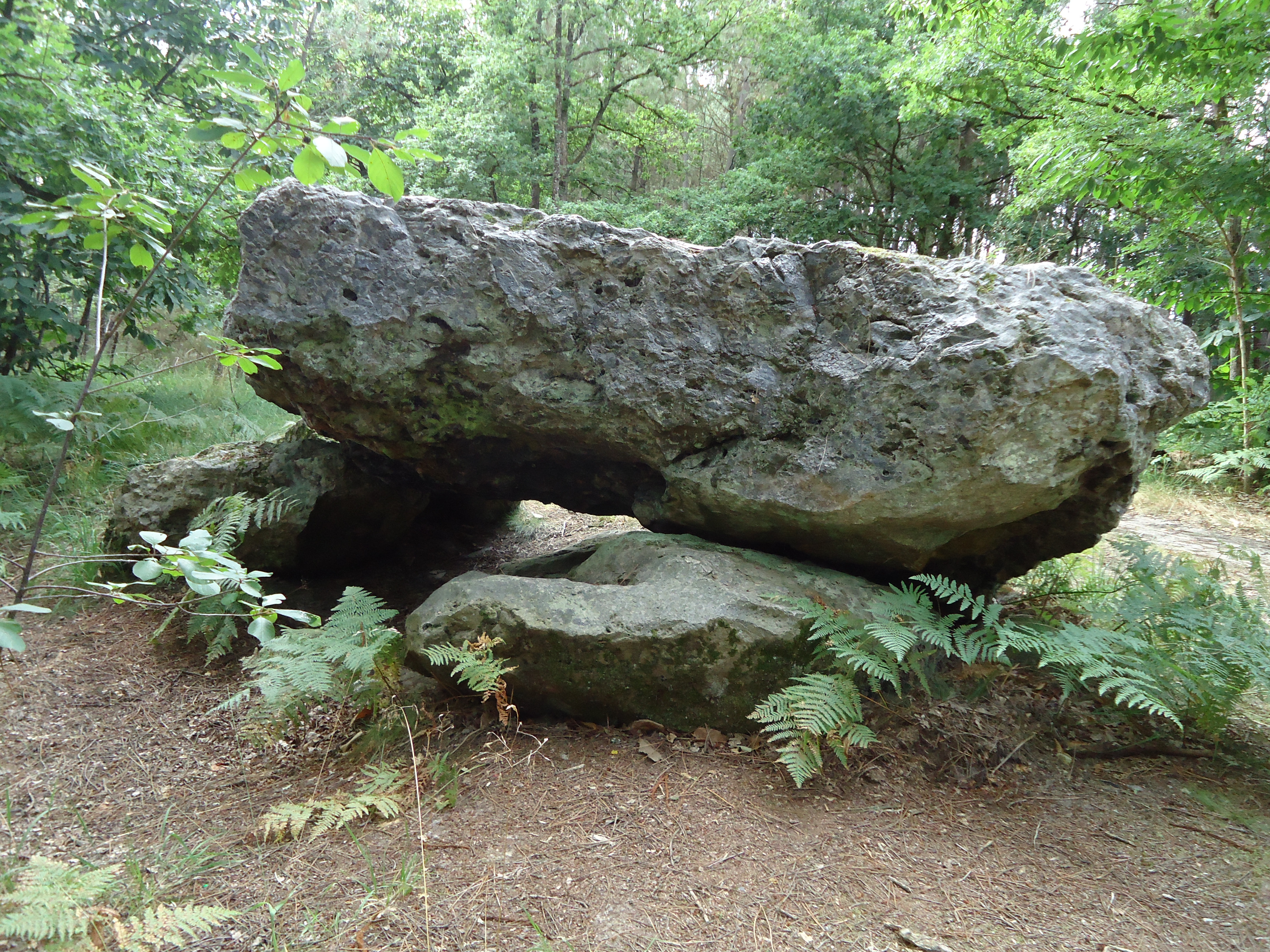 Dolmen dit "La Pierre Couverte" à Parigné-Le-Pôlin (72) - France